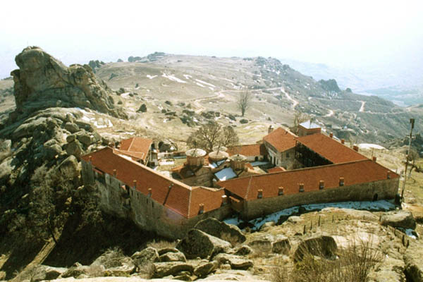 Поглед на манастирот треескавец